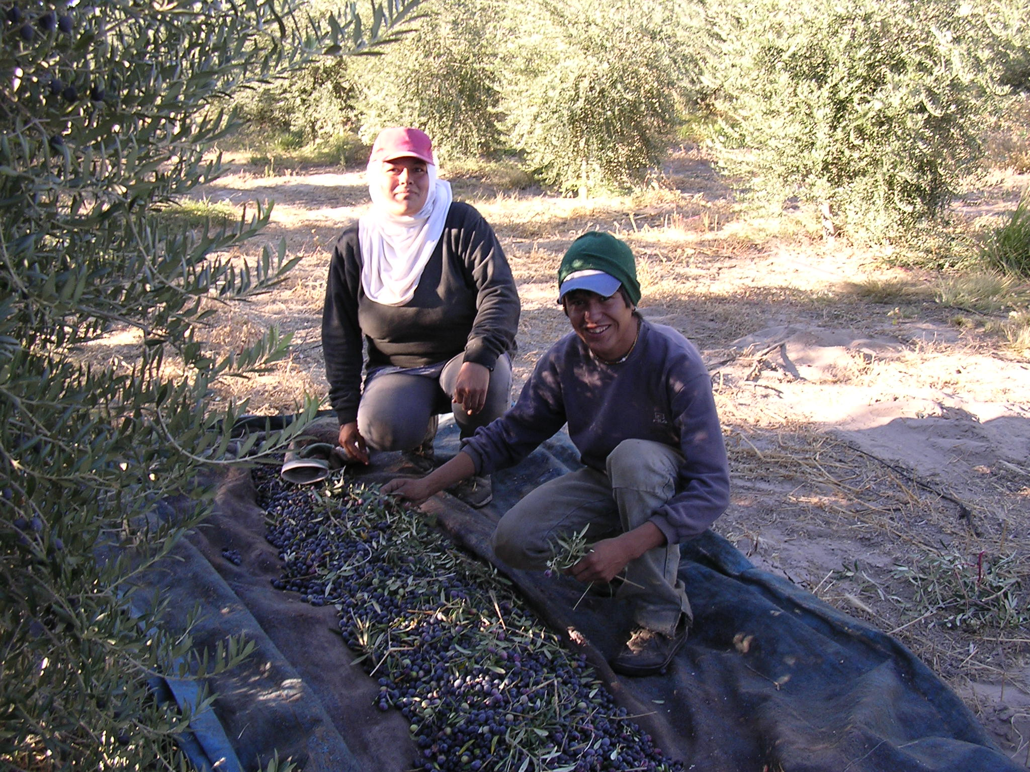 Cosecha manual del olivo en las empresas olivícolas del Depto. Pomán.